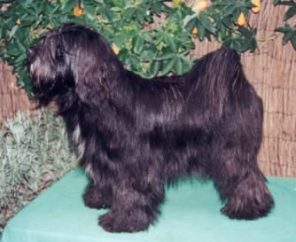 Terrier tibetano Ch. Enchu de Qinghai es campeón de España, Portugal, Gibraltar e Internacional.